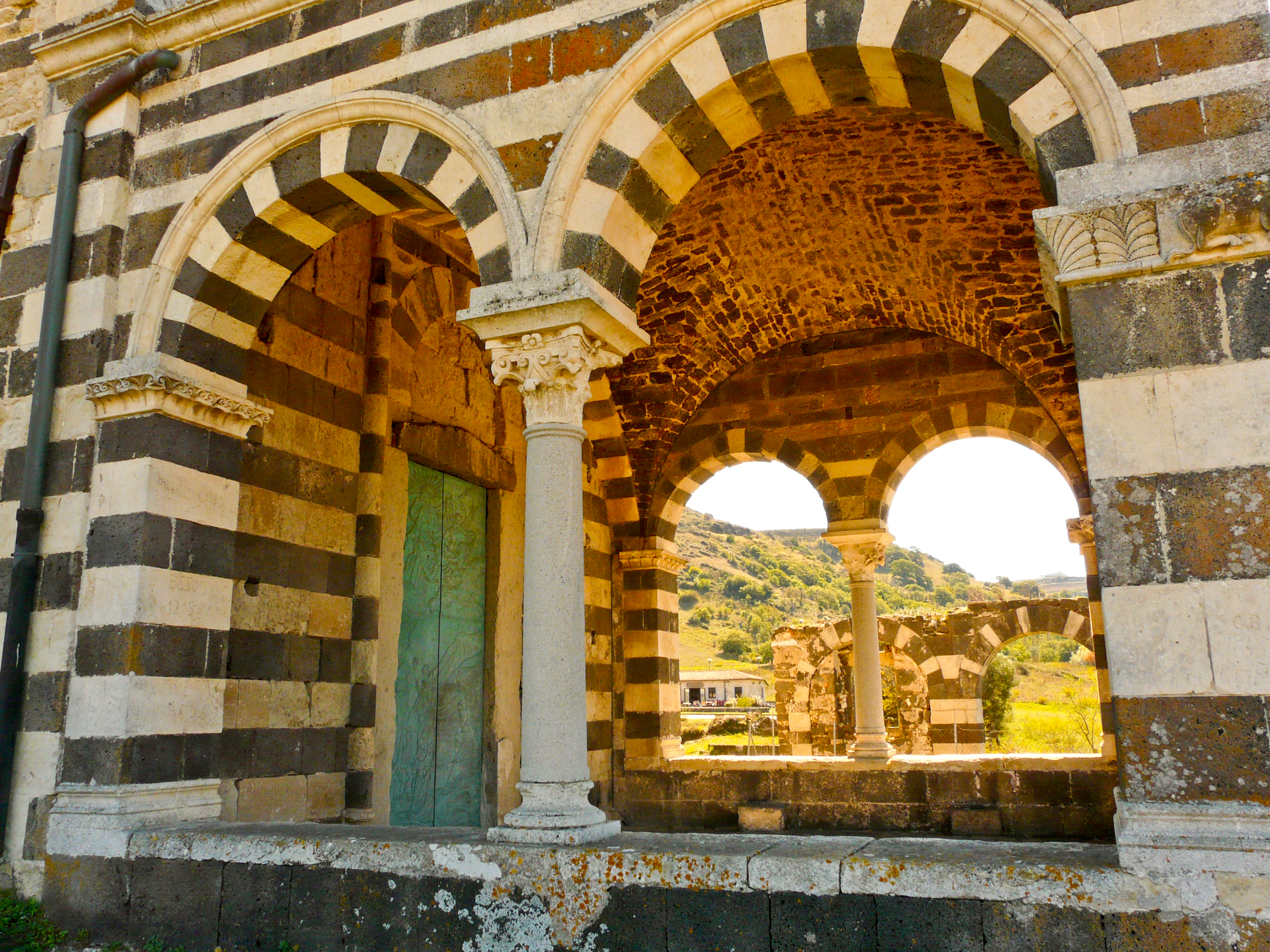 Baulicher Zustand der Abteikirche